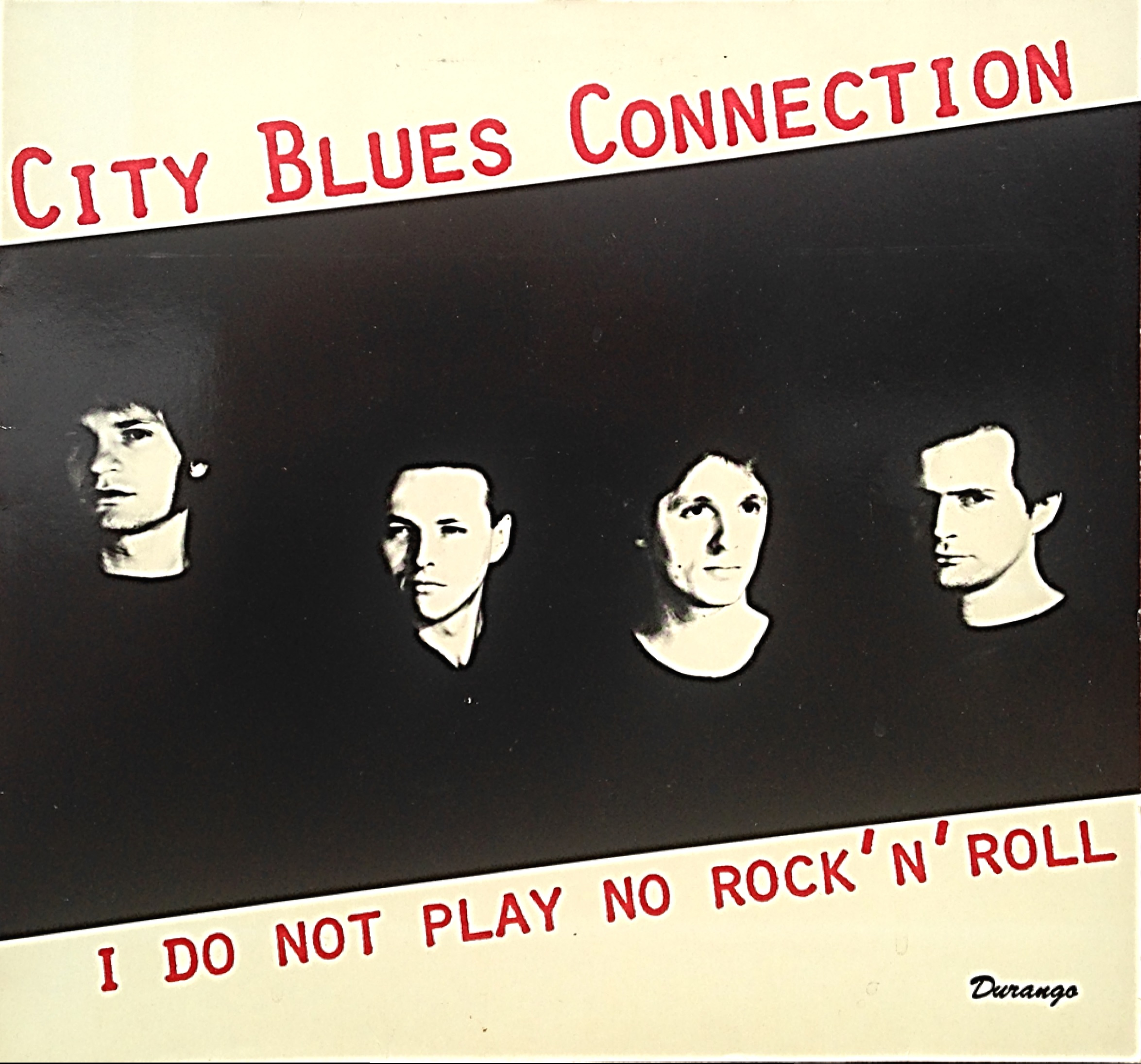 LP-Cover von 1984: I Do Not Play No Rock'n'Roll